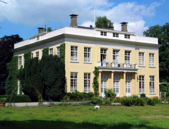 Harinxmastate te Beetsterzwaag